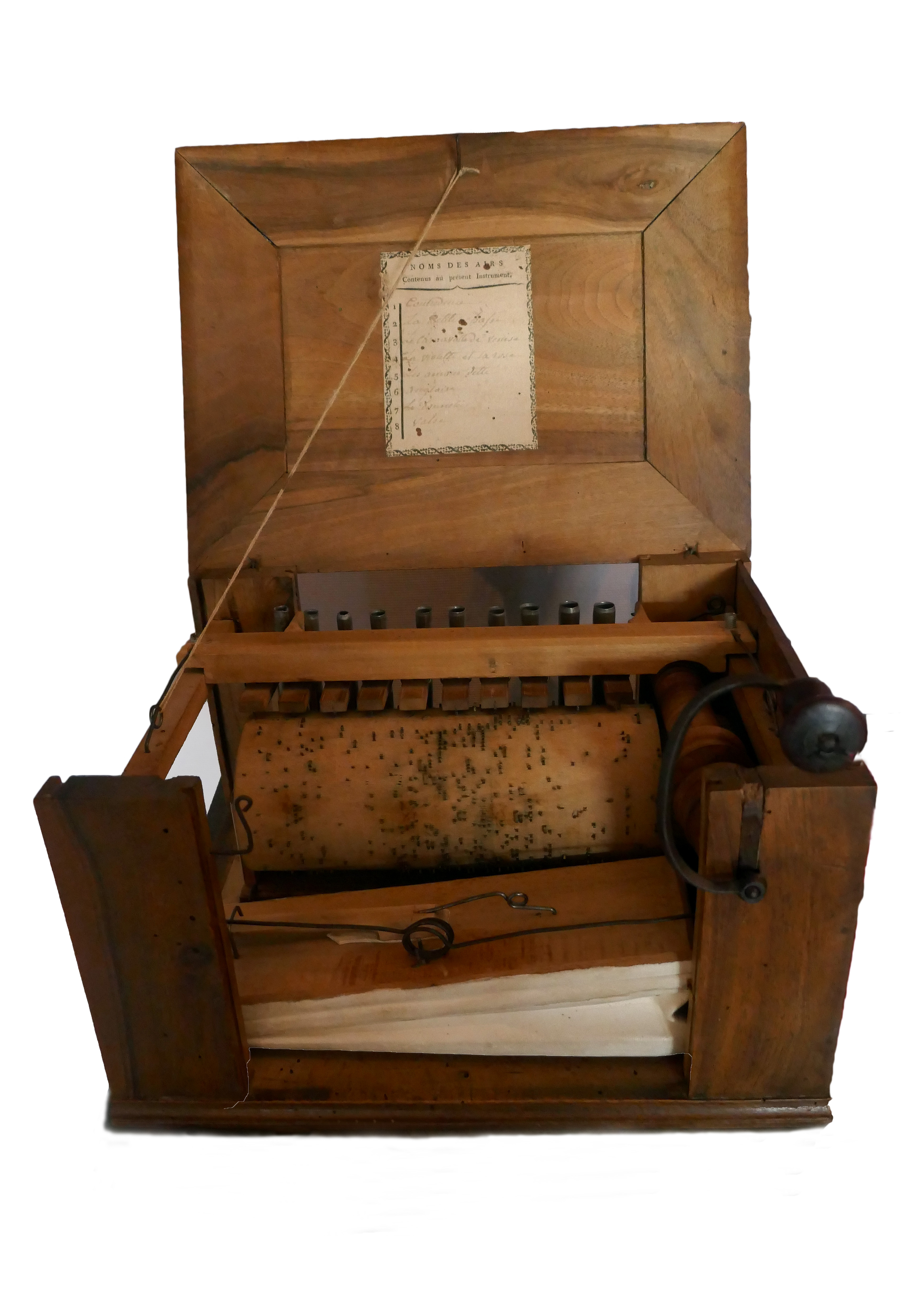 Serinette Jacotel Châtenois, début du XIXe siècle 10 tuyaux Maison de la musique mécanique à Mirecourt